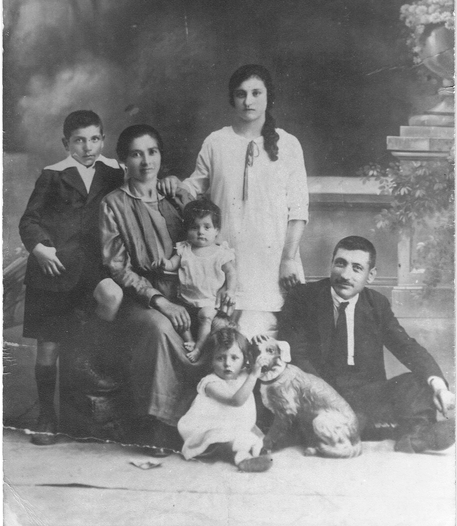 Enrique Jaso Paz (sentado no chan); Josefa Martínez San Juan (sentada na cadeira); a filla máis vella, Evangelina Jaso González, que mostra cabeleira; o rapaz, Enrique Jaso González (ambos os dous son o froito do primeiro matrimonio do pai); outra nena, Josefita (no chan, acariñando ao can), máis nova; e Loliña, no colo da nai.